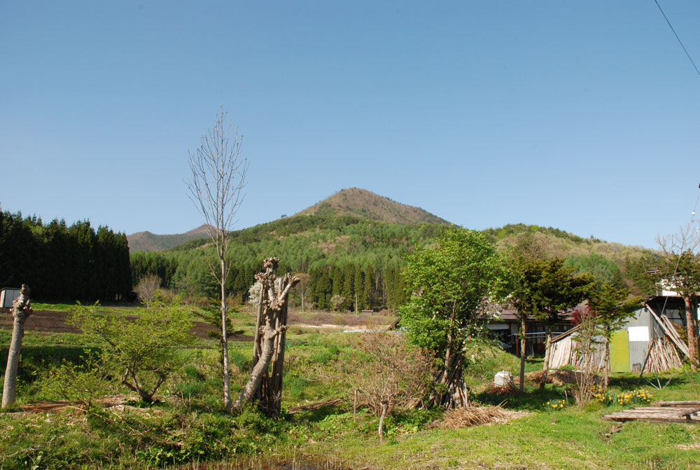 斑尾山の南端のすそ野。手前の落葉している樹の後ろの出っ張りが斑尾山の山頂の可能性がある。信濃町荒瀬原から。斑尾山を表す画像としては不適格。